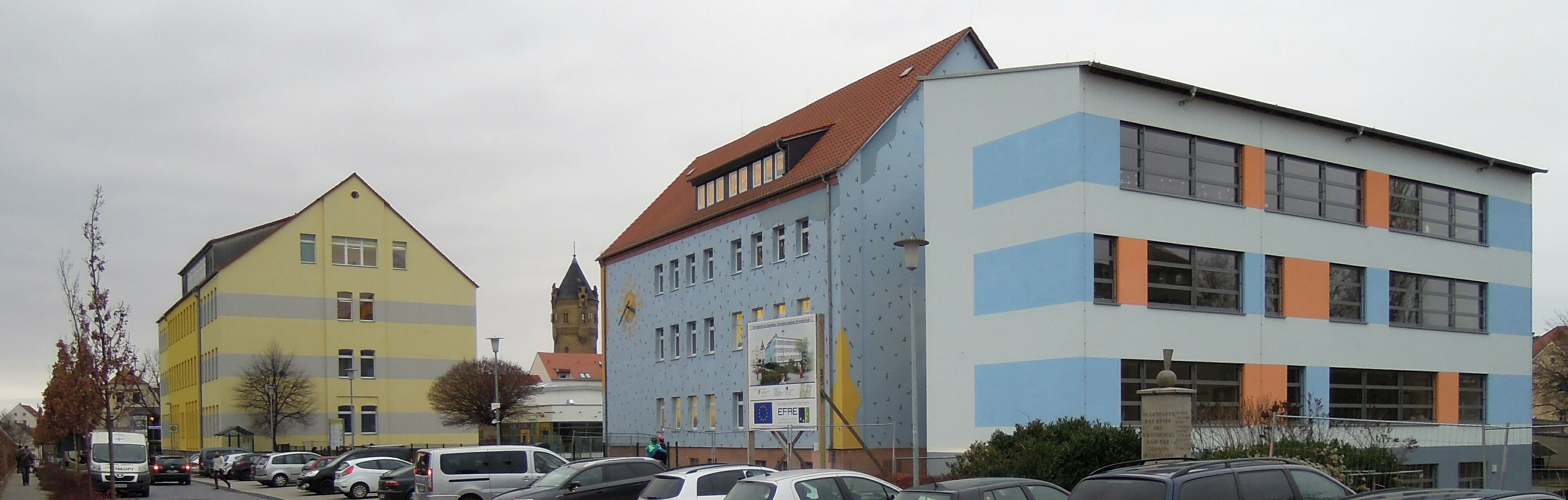 Freies Gymnasium Zwenkau (links im Bild) und Grundschule mit Erweiterungsbau (rechts im Bild) in der Pestalozzistraße im Dezember 2014.